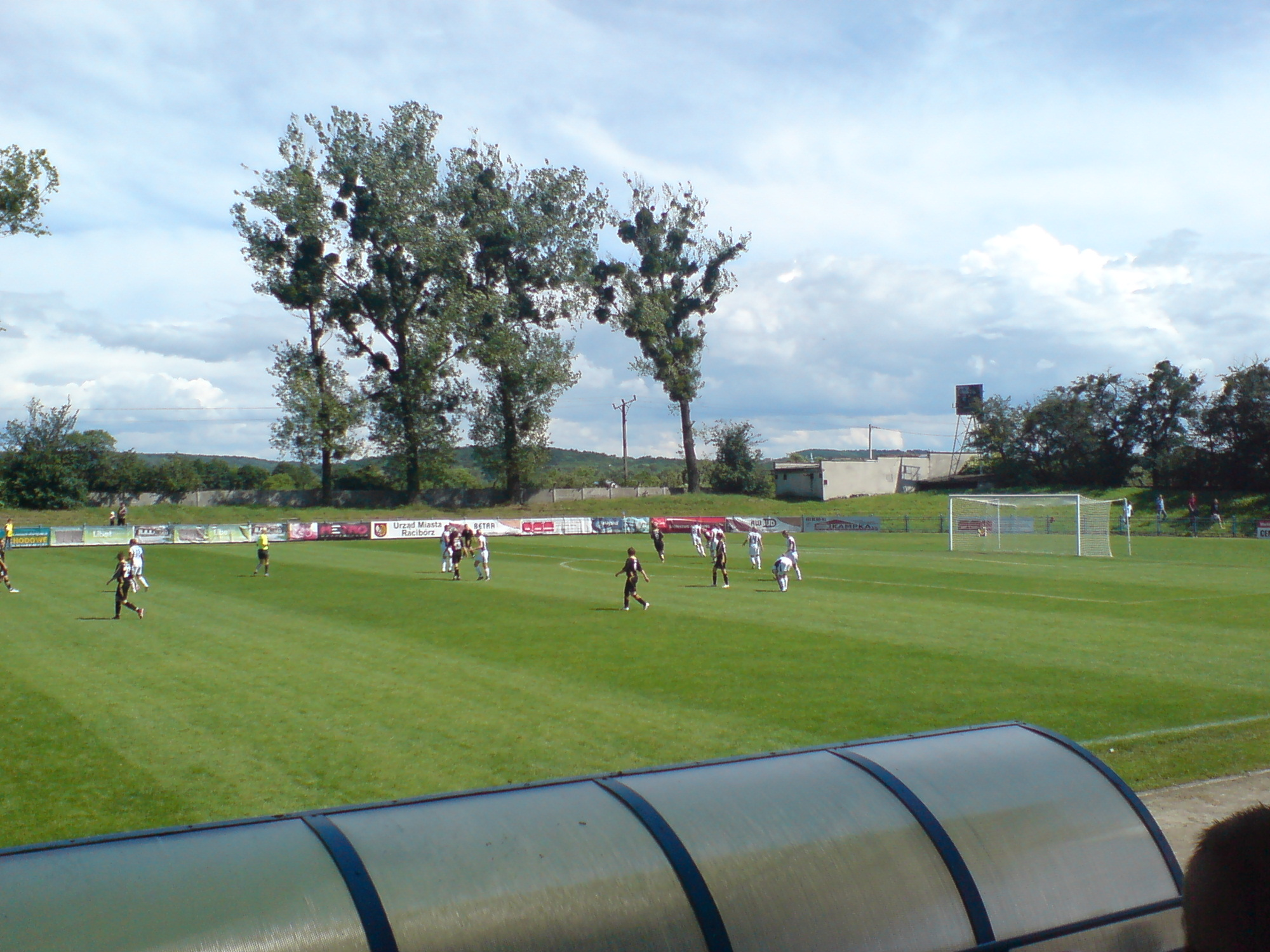 Półfinał Pucharu Polski Kobiet w piłce nożnej 2009 Unia Racibórz - AZS Wrocław 0:2 (0:0) na stadionie Unii Racibórz przy ul. Srebrnej 12